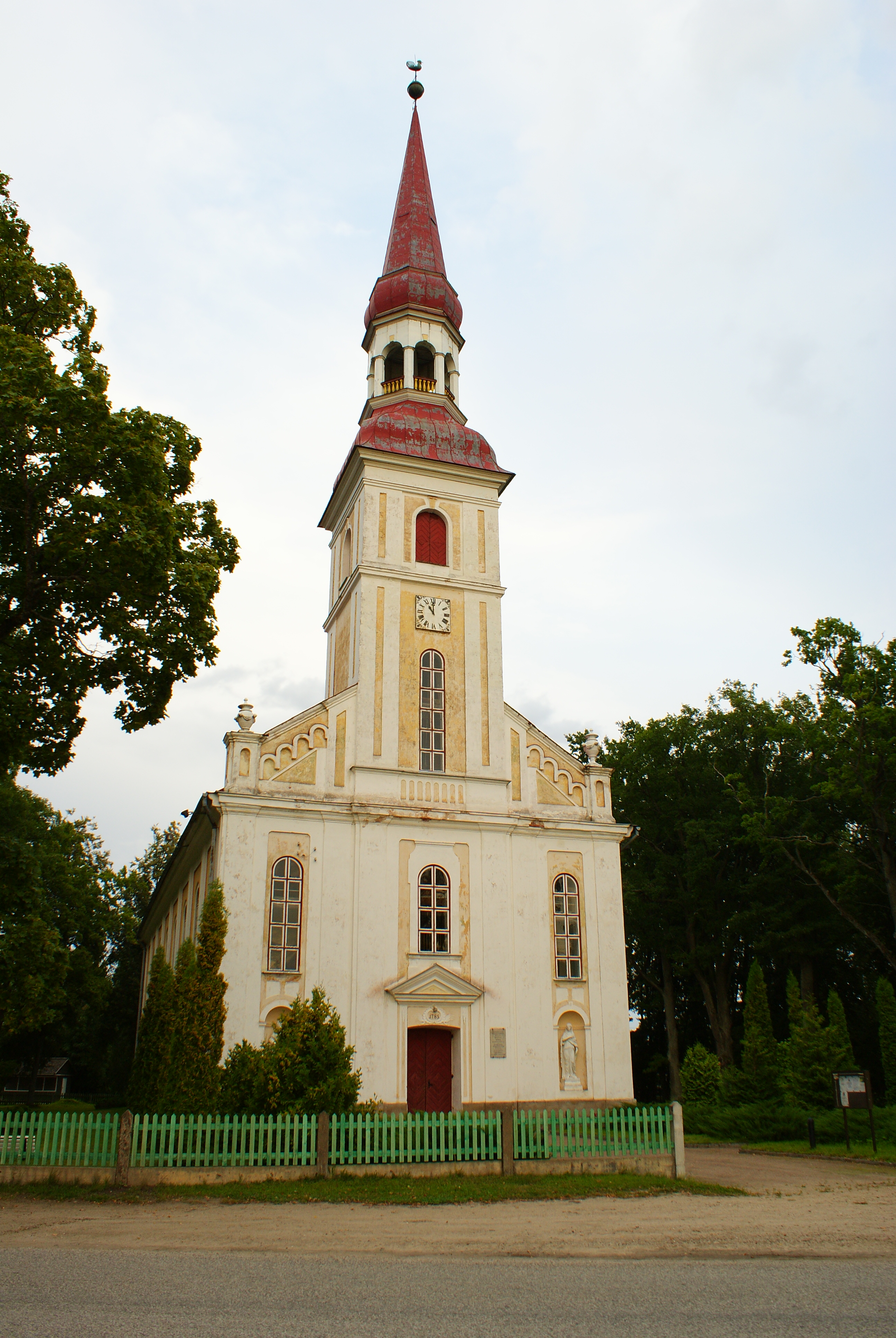 Räpina kirik